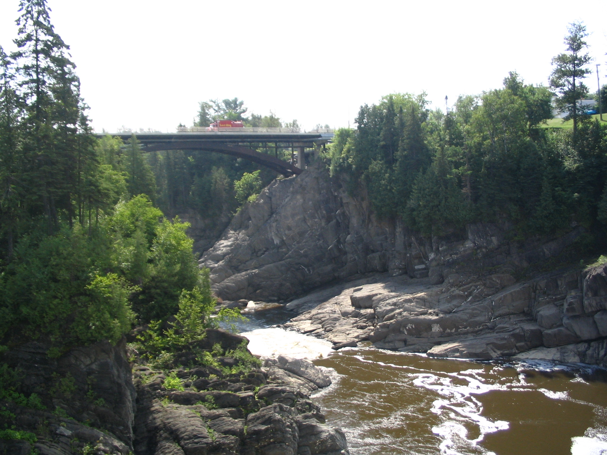 Gorges et pont à Grand-Sault, au Nouveau-Brunswick.